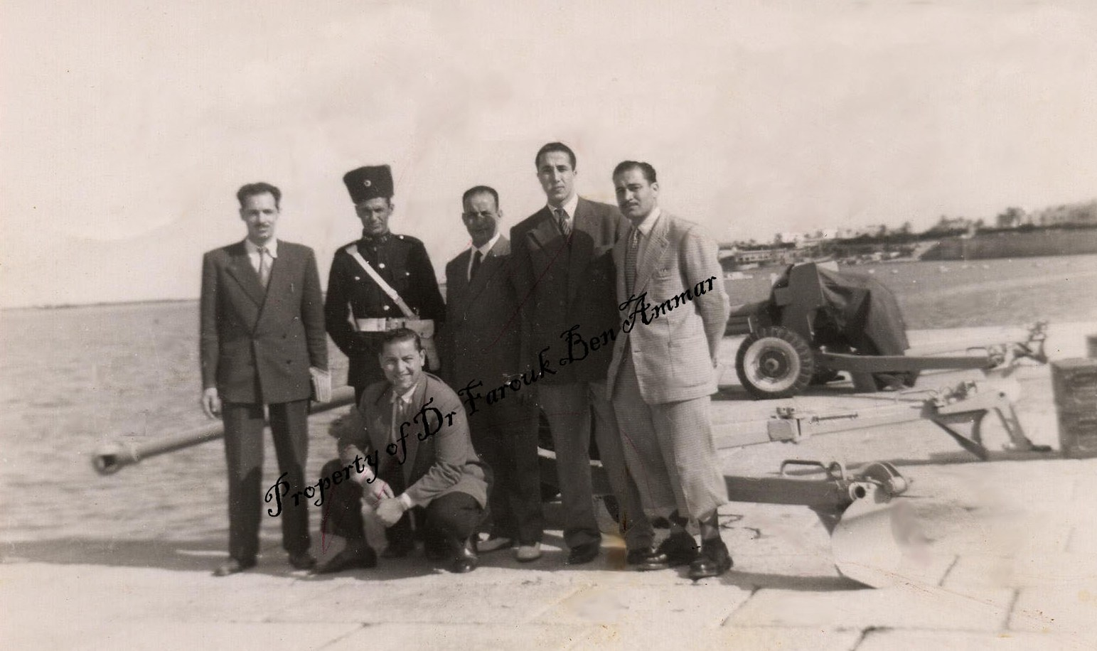 De droite à gauche : Ridha Ben Ammar, feu Ahmed Ben Bella et un groupe de résistants au port militaire de Tripoli après l’évasion héroïque de Zendalat Bardo du 22 août 1953.